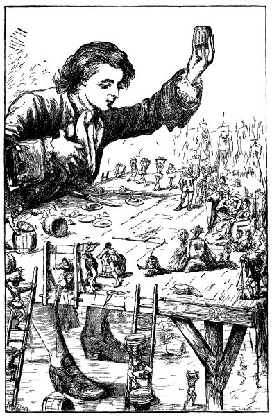 Imagens do Projeto Gutenberg Viagens de Gulliver para várias regiões remotas do mundo escrita por Jonathan Swift, d.d. e publicadas por Thomas M. Balliet com trinta e oito ilustrações e um mapa, ano 1900